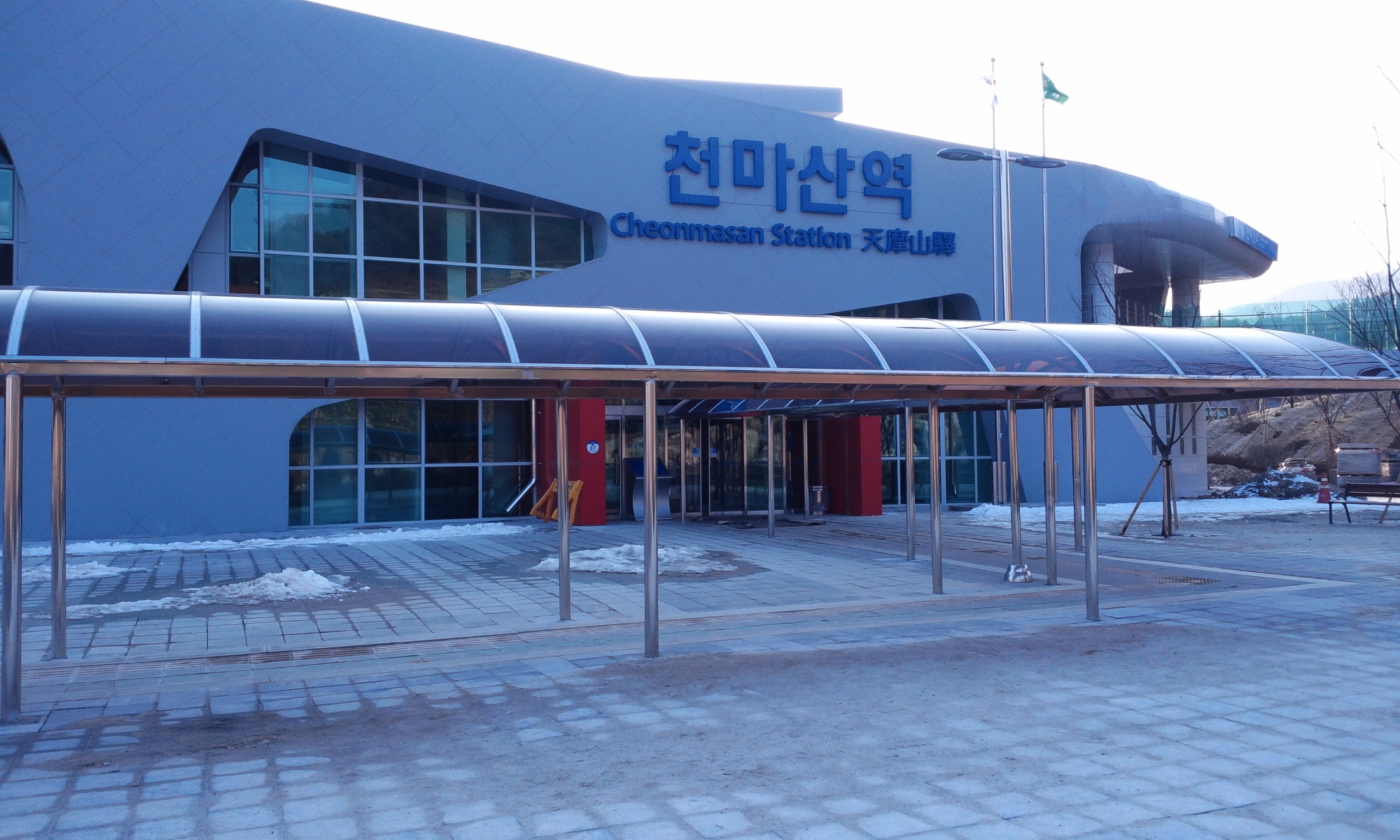 천마산역 2번 출구